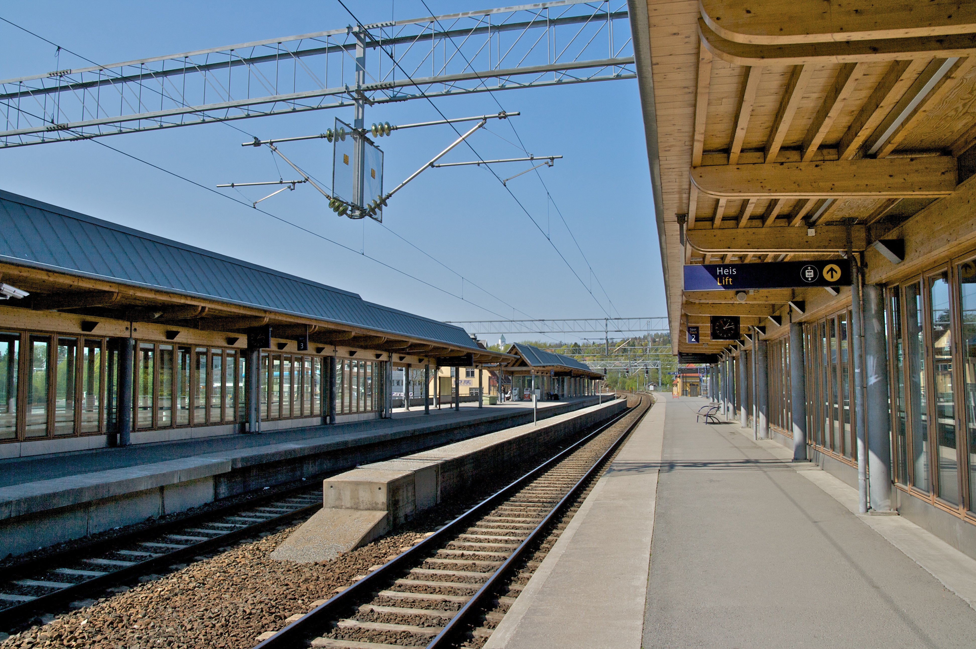 Skøyen stasjon i Oslo.